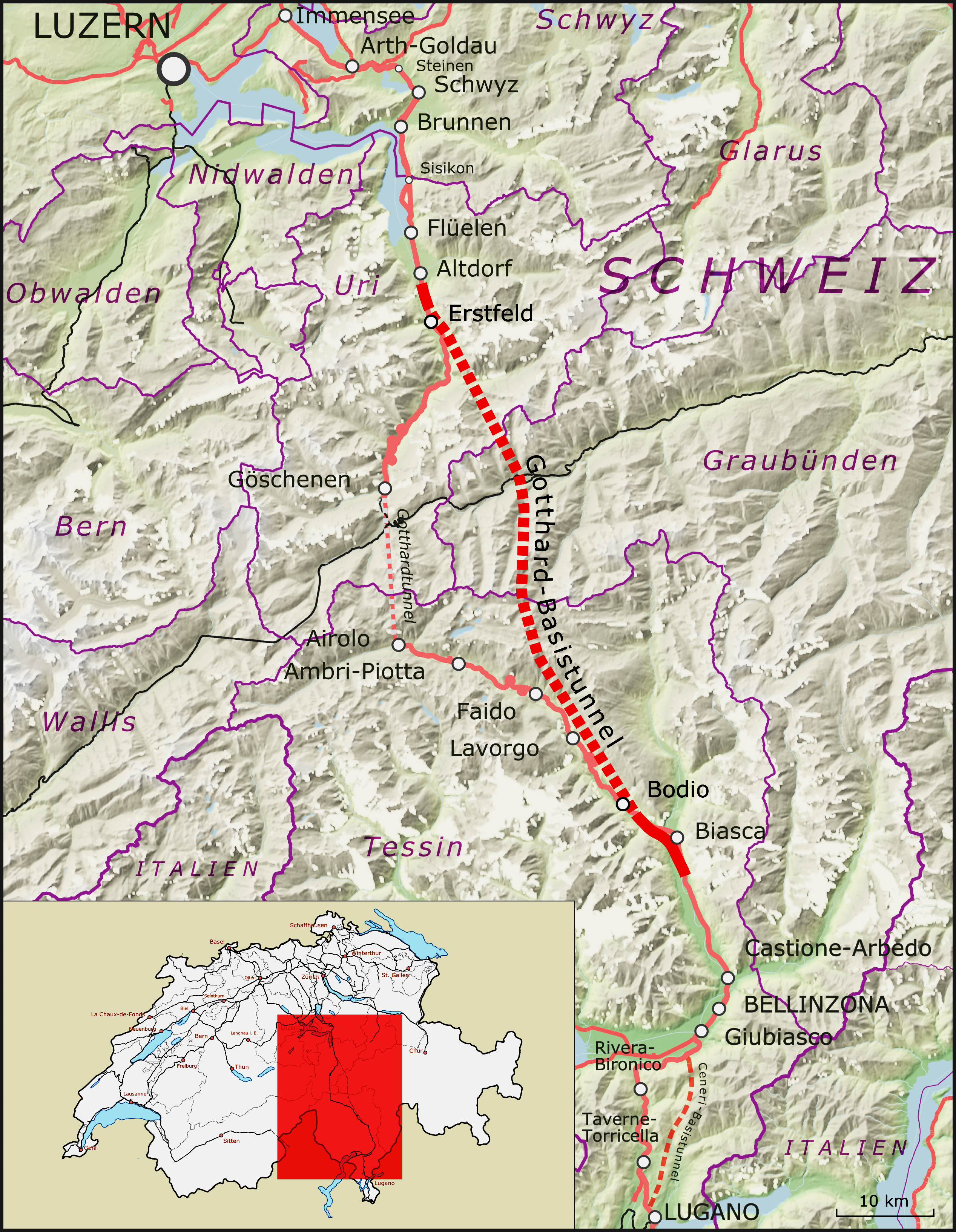 Karte des Gotthard-Basistunnels, Schweiz